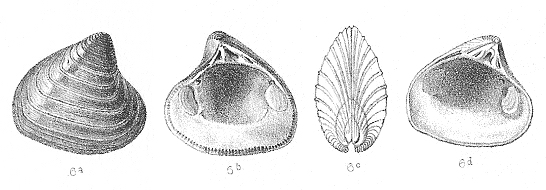 Astarte trigonata - Fossil bivalve from Pliocene deposits near Antwerp (Belgium)